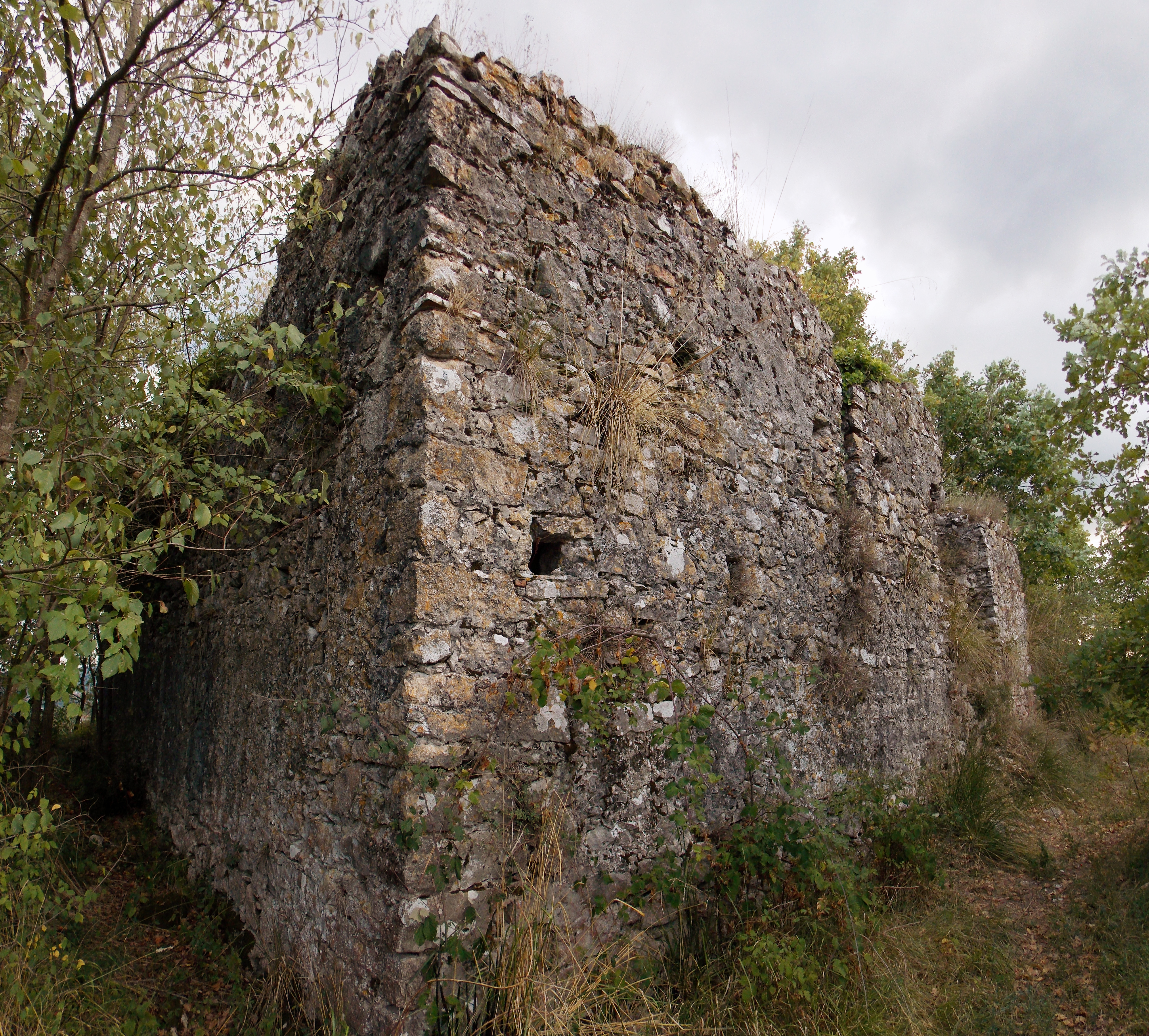 Ruderi della chiesa di Sant'Angelo a Piesco, Benevento: vista posteriore